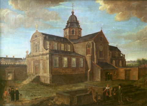 View on the Sint Adriaansabdij (Geraardsbergen) in 1799.